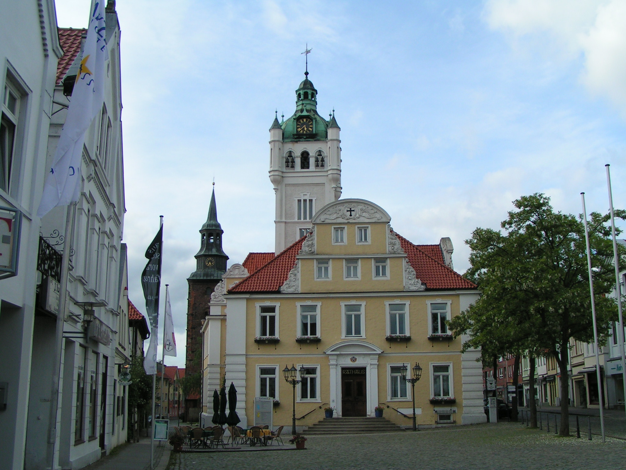 Rathaus und Johanniskirche in Verden (Aller)